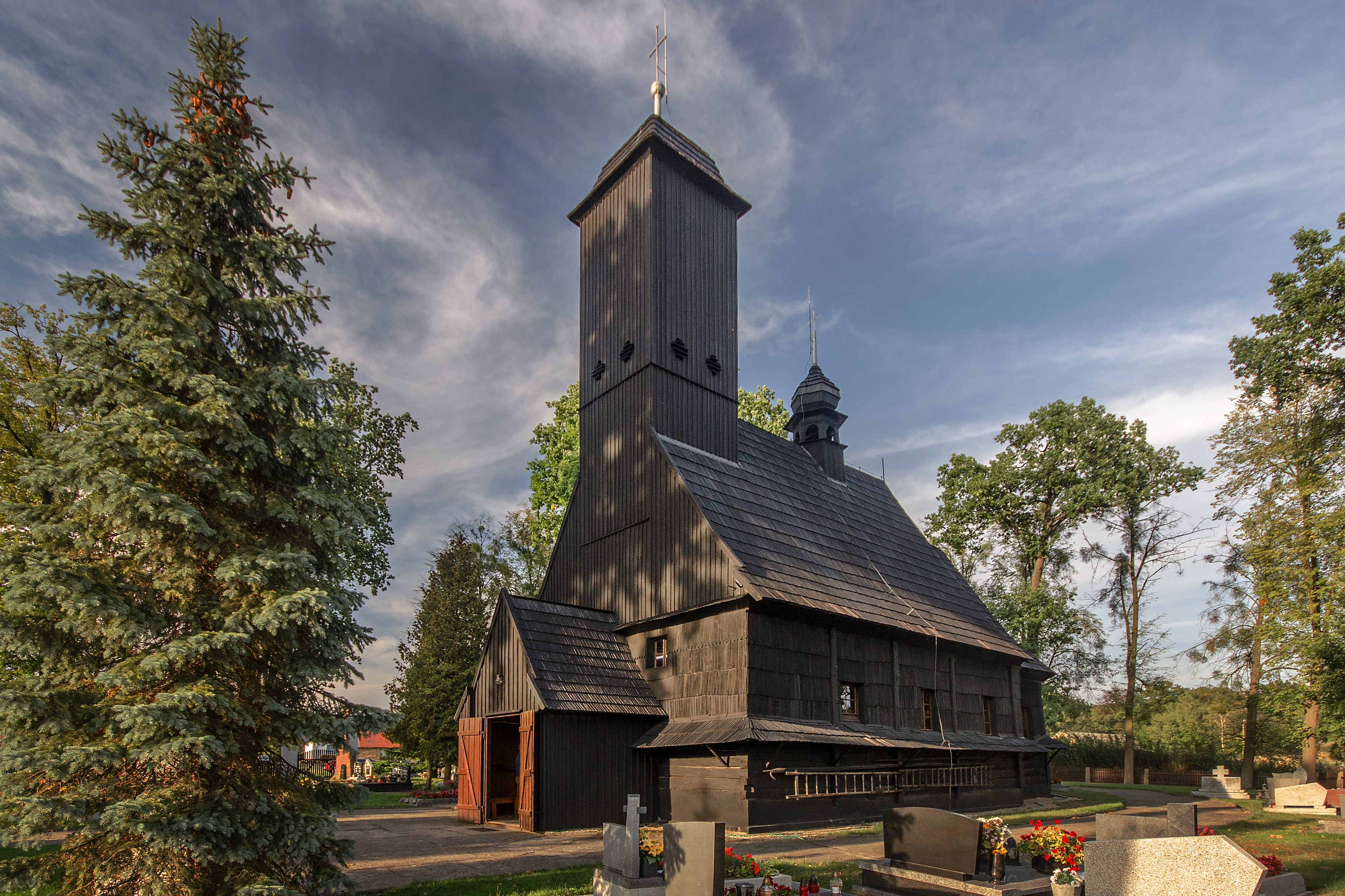 Wędrynia, kościół fil. p.w. św. Jana Chrzciciela, 1791